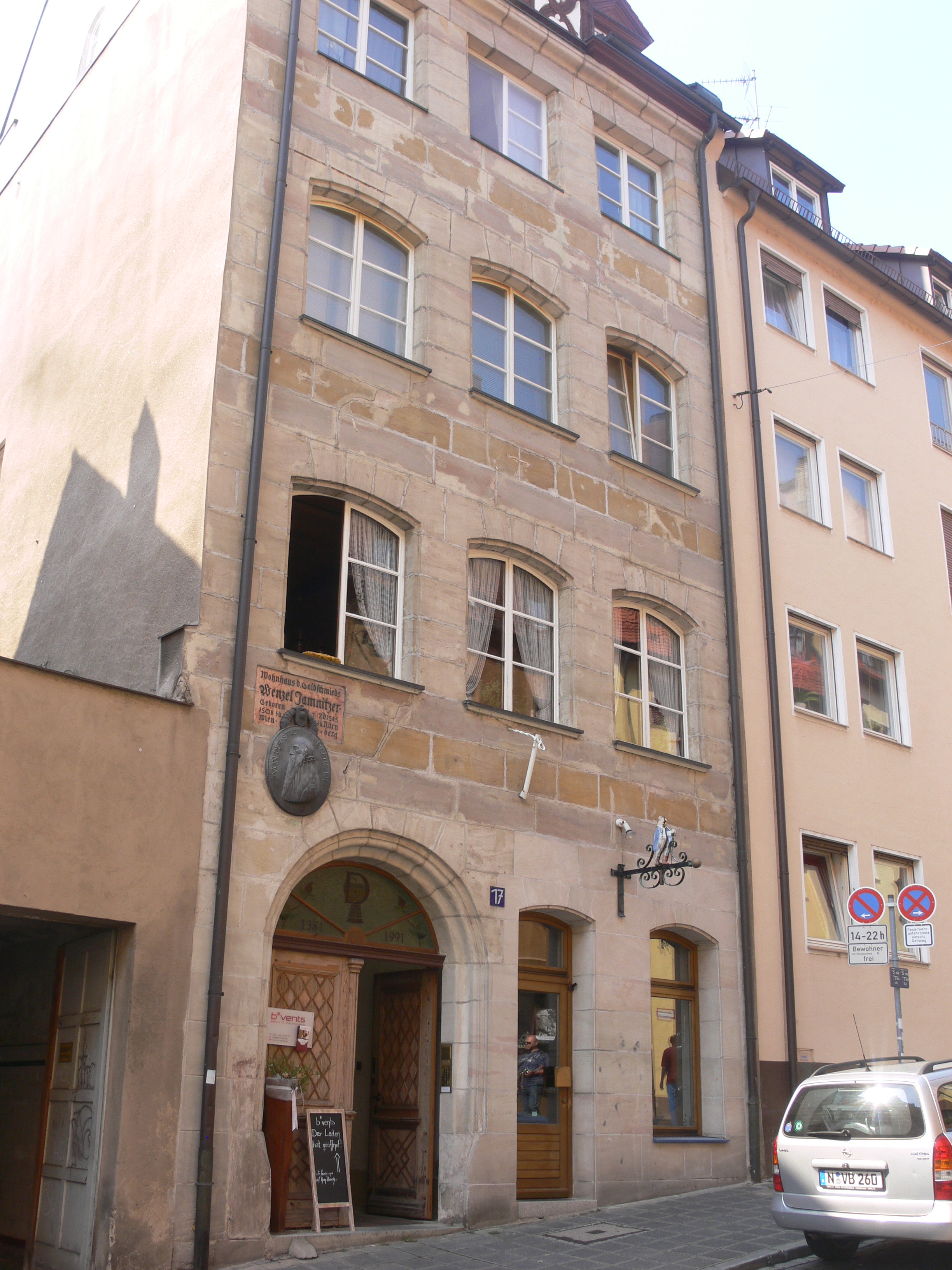 Maison natale de Wenzel Jamnitzer. Nuremberg, Albrecht-Dürer-Strasse 17.